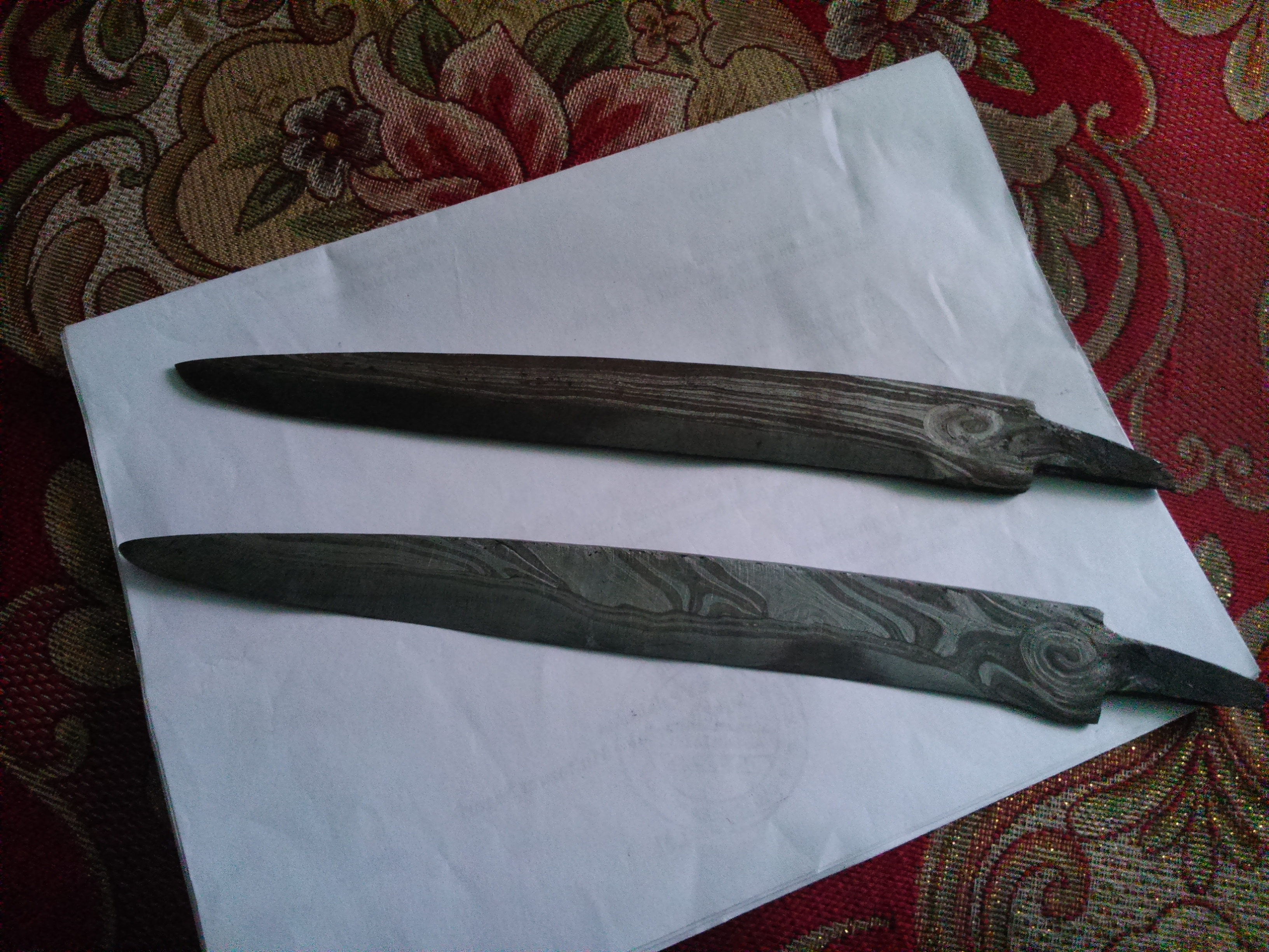 Bugis